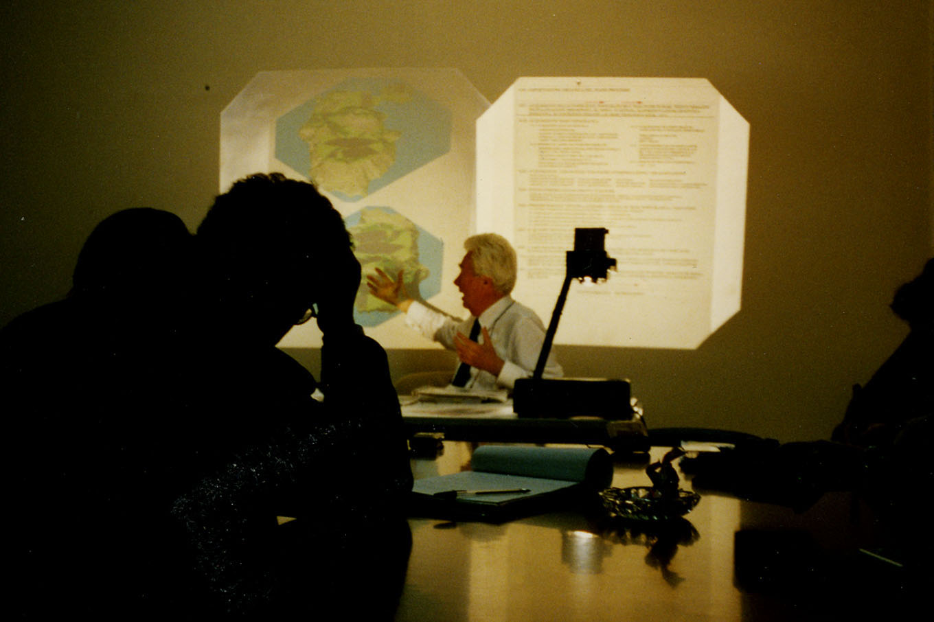 Conferenza sulla pianificazione tenutasi presso l'Università degli studi di Palermo